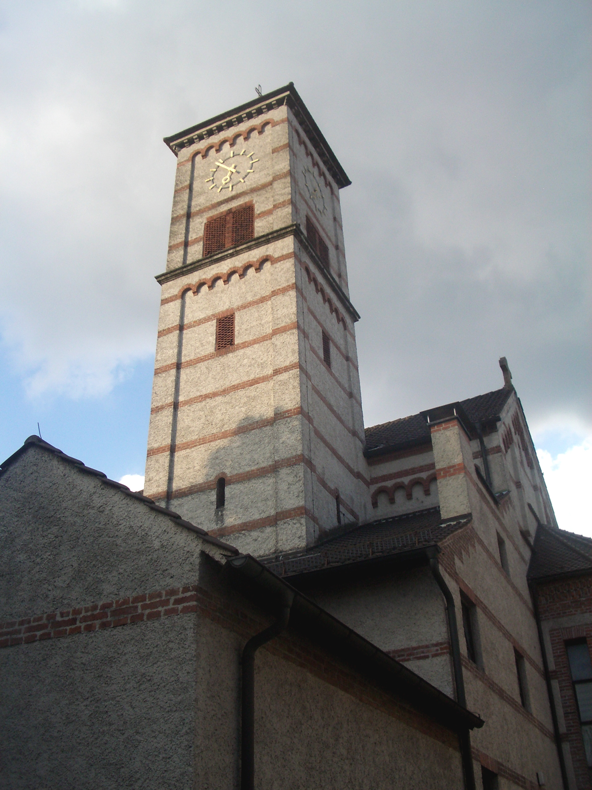 Kirche St. Johann Baptist, Neu-Ulm Architekt: Dominikus Böhm